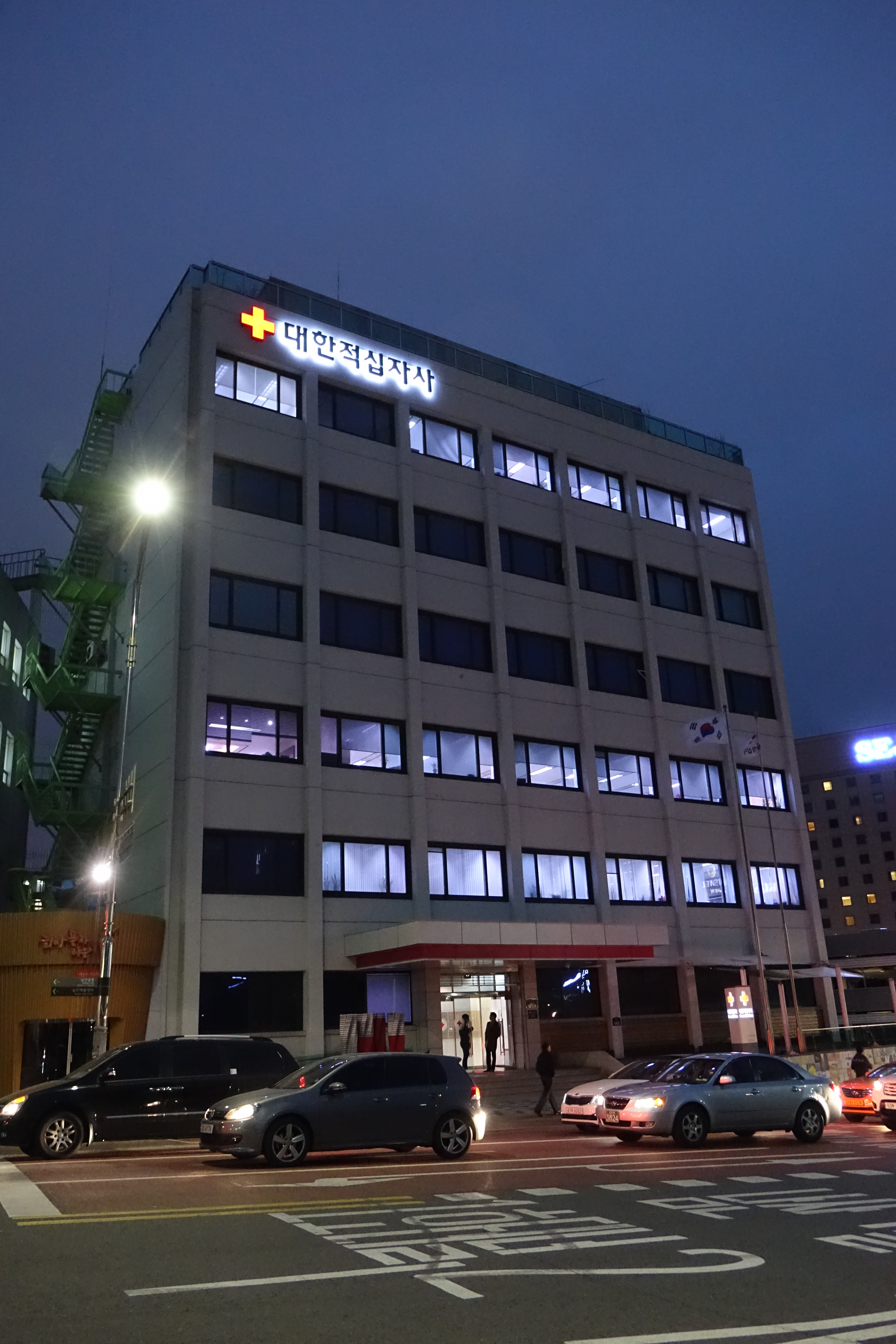 2015년 2월 28일 최광모 업로드.